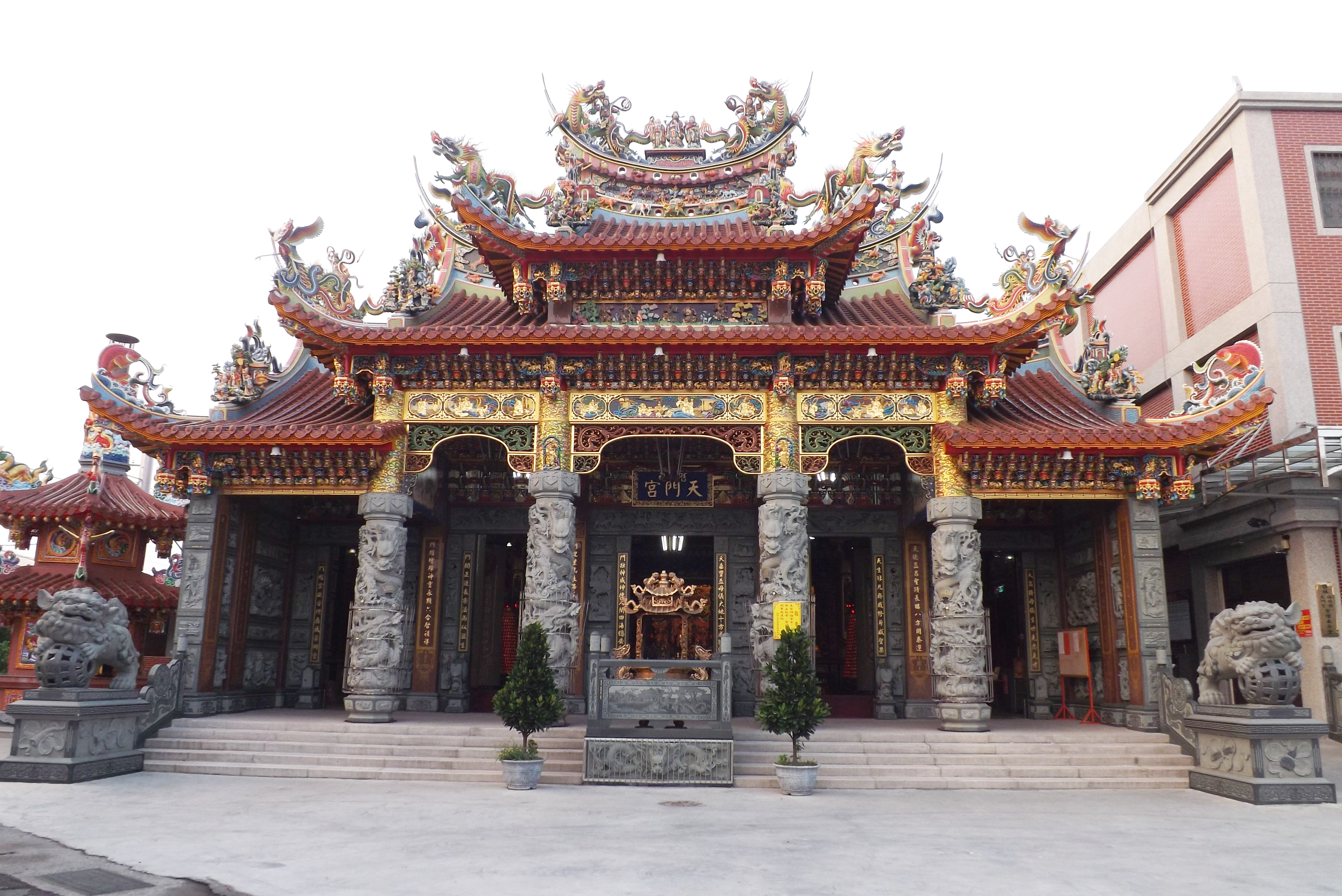 舊社天門宮